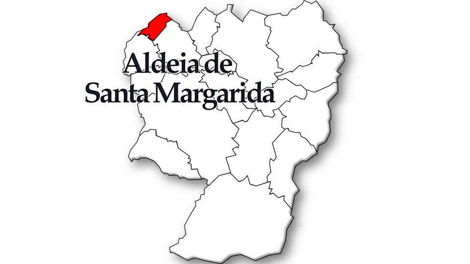 População